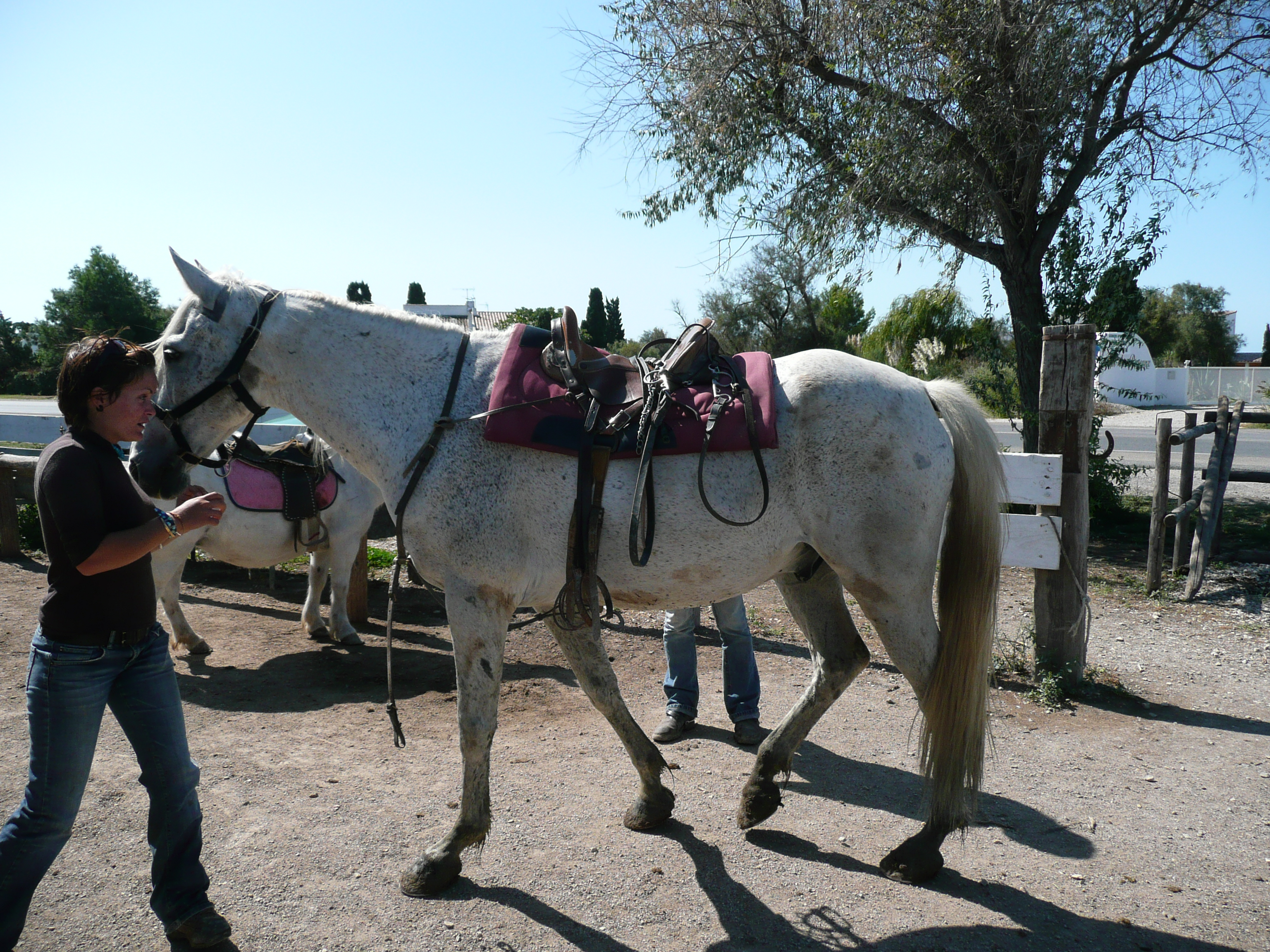 Camargue horse